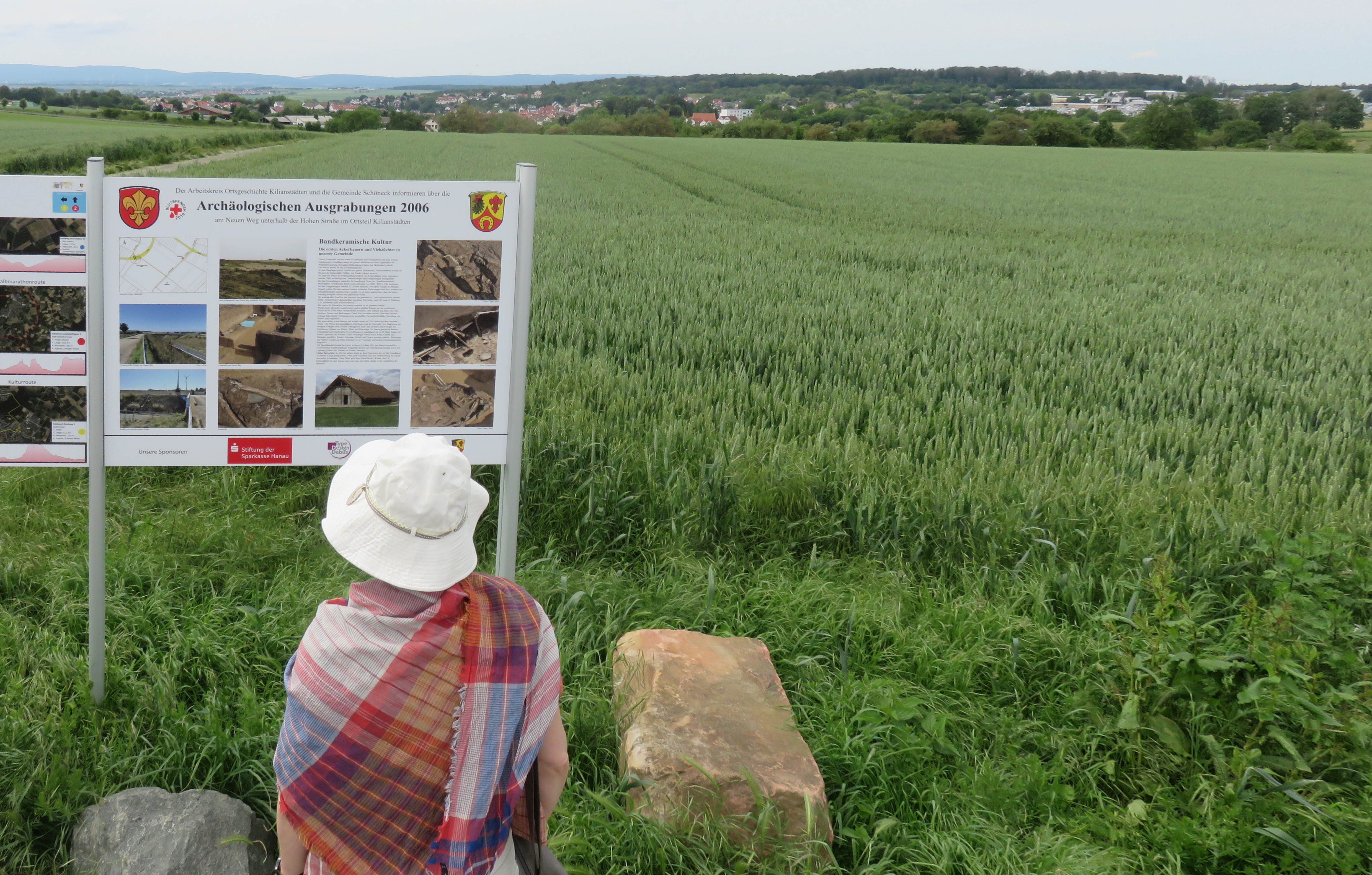 Hinweistafel der Gemeinde Schöneck (Hessen) zu den Ausgrabungen eines 7000 Jahre alten Massengrabes der Bandkeramischen Kultur im Ortsteil Kilianstädten. Der Blick geht von der Infotafel am Rande der seit Jahrhunderten hier verlaufenden Hohen Straße über das Gelände der seinerzeit in Hanglage existierenden Bandkeramischen Siedlung zu den nahen Häusern der Gemeinde Kilianstädten. Das Massengrab befand sich (von hier aus nicht sichtbar) links über der Tafel am Fuße des Hangs. Position der Tafel: 50°11'33.5"N 8°52'08.2"E 50.192624, 8.868931